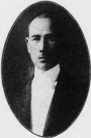 川口為之助